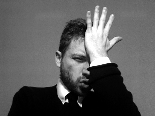 facepalm